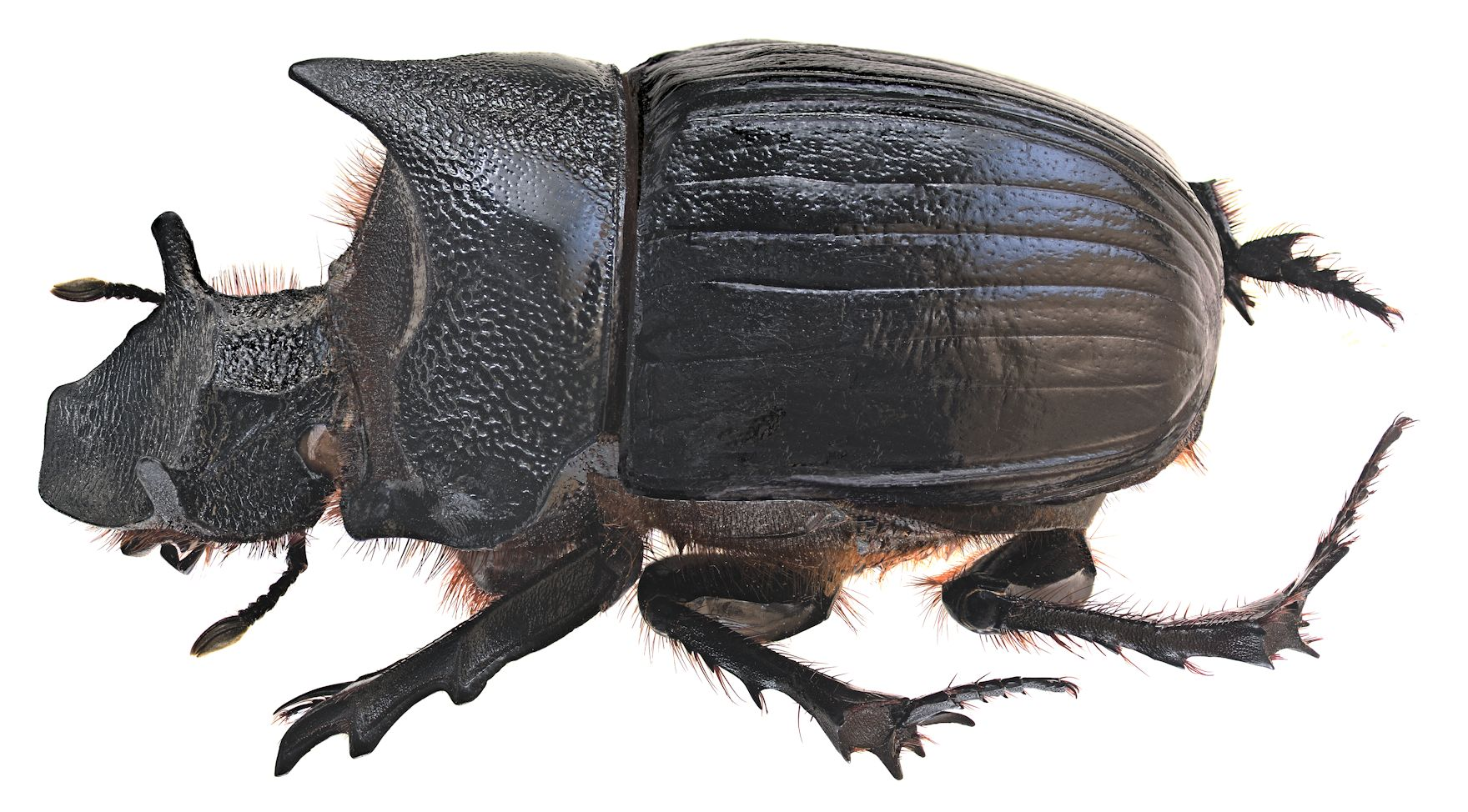 Familie: Scarabaeidae Grösse: 60 mm Fundort: Indien, Nilgiri Hills leg. Rautenstrauch; det. U.Schmidt Foto: U.Schmidt, 2005